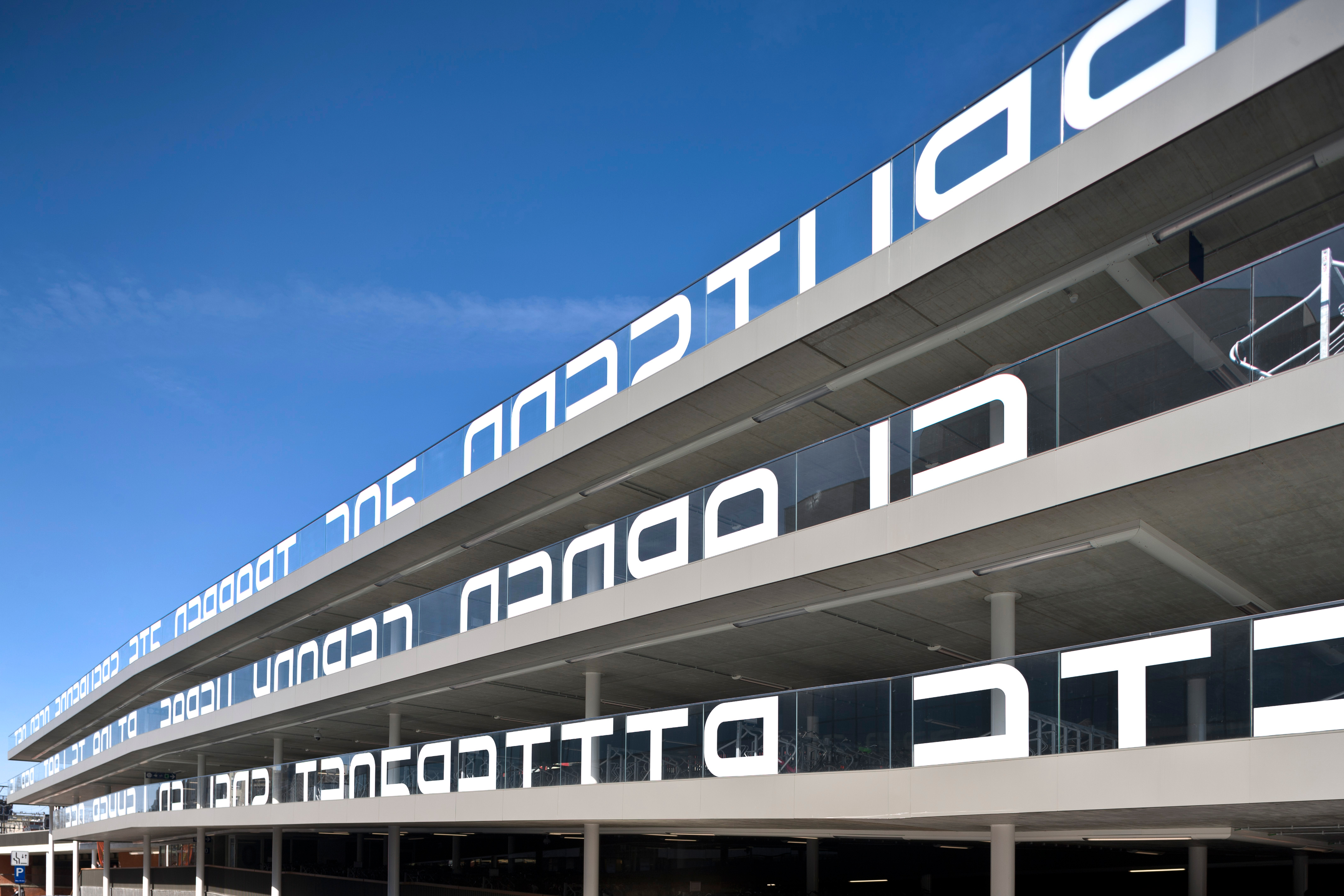 Bicycle storage at Berchem Station showing typographic intervention by Hugo Puttaert and Jelle Maréchal.